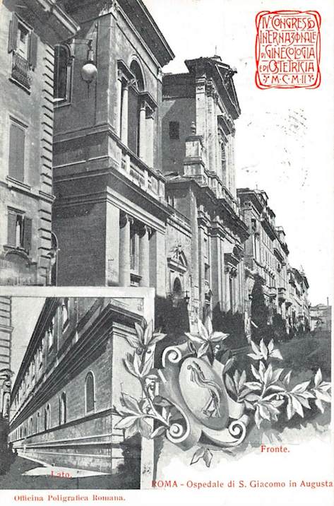 Cartolina San Giacomo in Augusta, Roma - IV Congresso Internazionale di Ginecologia e Ostetricia (1902)